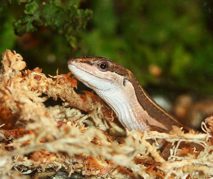 Takydromus sexlineatus Weibchen